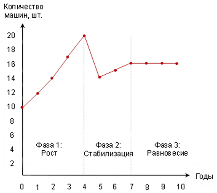 График прироста основных средств